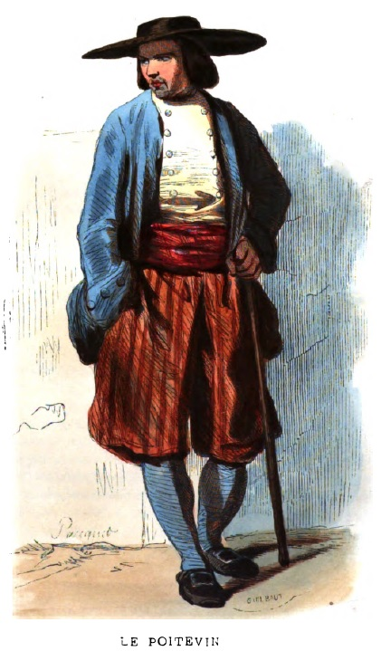 Le Poitevin.